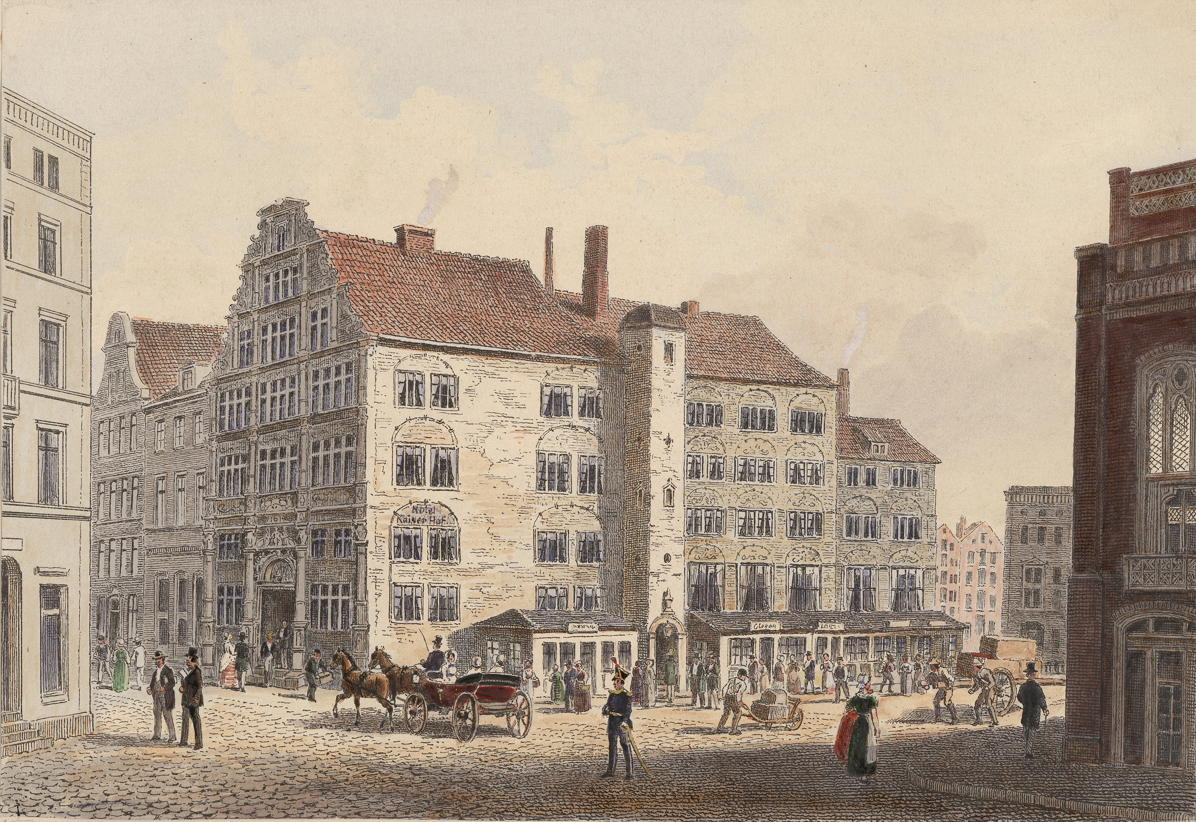 Hotel Kaiserhof- hier wurde 1743 die Freimaurerloge "St. Georg zum Kaiserhof, Hamburg" gegründet